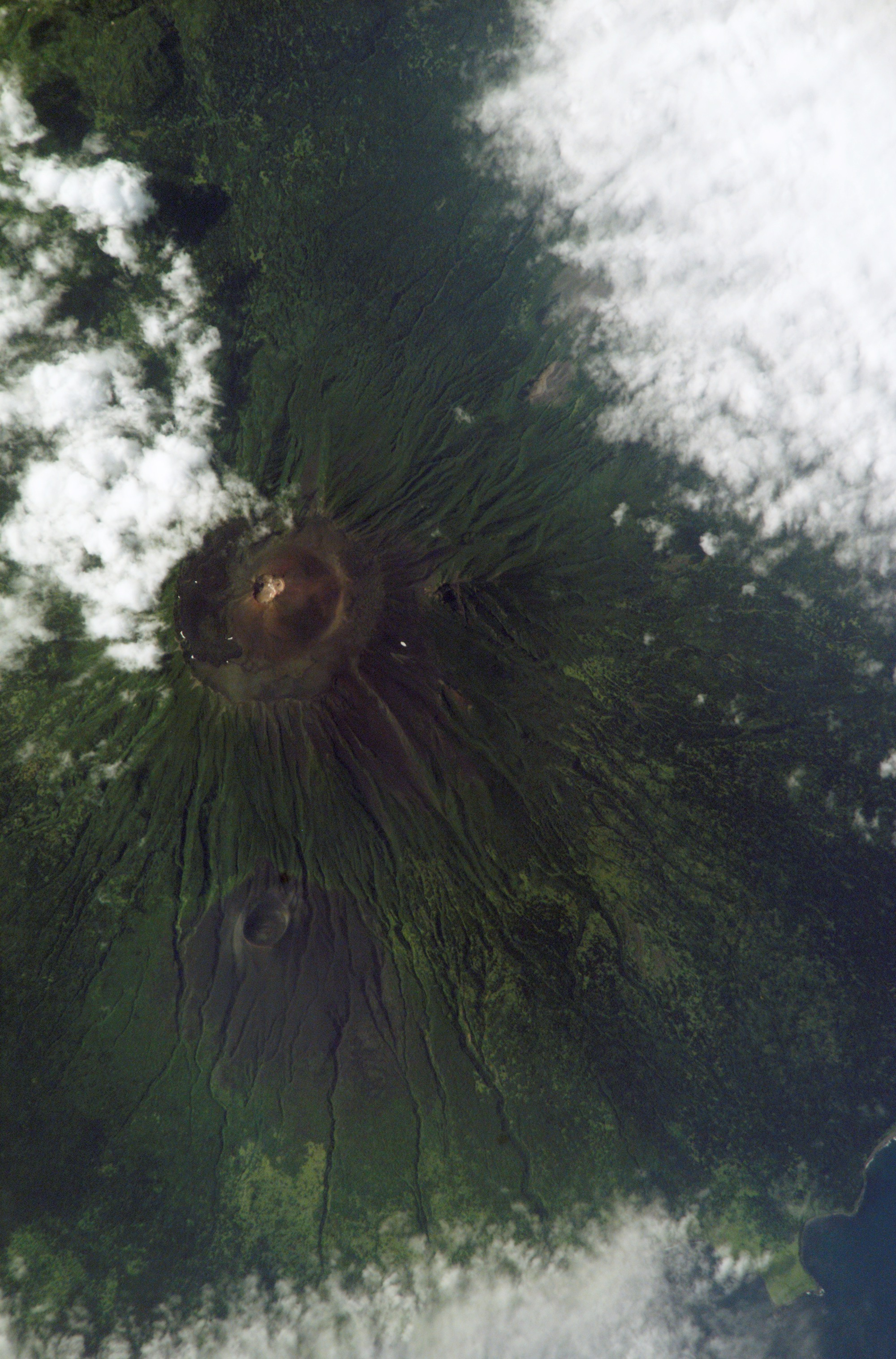 Вулкан Тятя. Снимок с МКС. Фрагмент